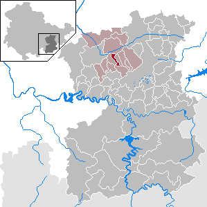 Nimritz in Thuringia - Saale-Orla-Kreis